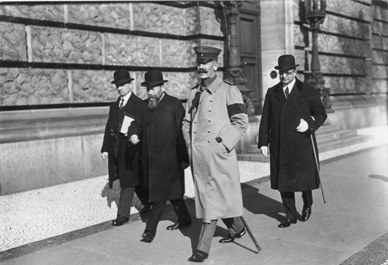 ADN-Zentralbild / Archiv Prinz Max von Baden, der deutsche Reichskanzler (3.10.-9.11.1918) und preußische Ministerpräsident begibt sich in Begleitung von Deutelmoser (links) und dem Chef der Reichskanzlei Wilhelm Freiherrn von Radowitz (rechts) in den Reichstag.